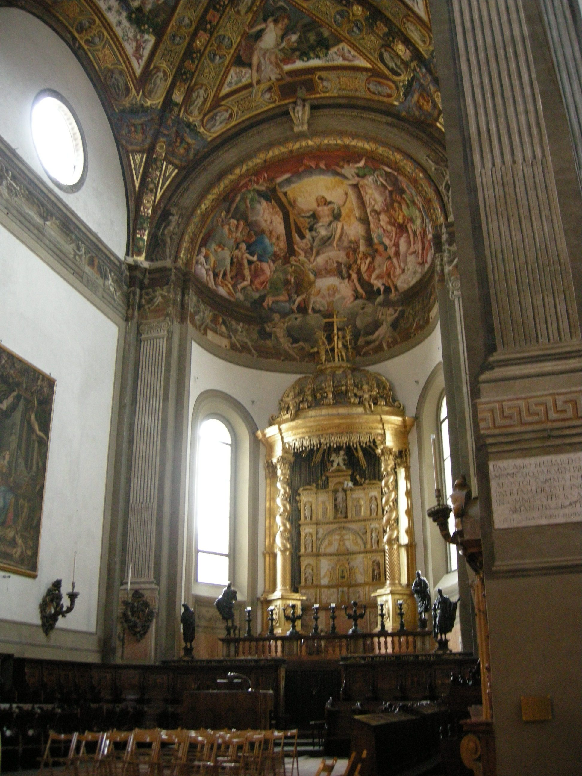 Duomo di parma, capocroce